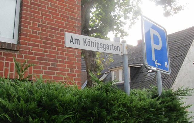 Straßenschild "Am Königsgarten" in Wyk auf Föhr